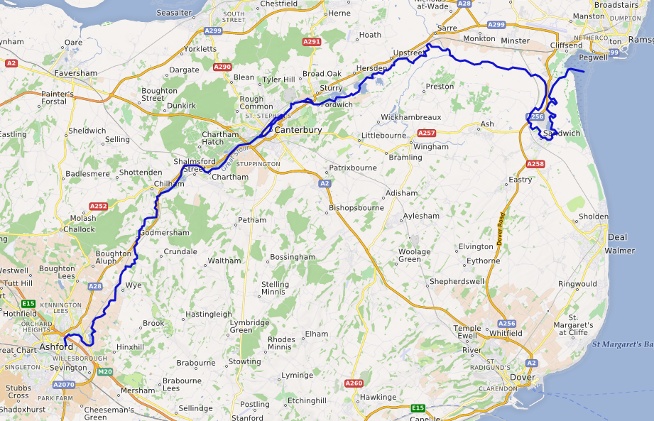 carte réalisée sur umap This map may be incomplete, and may contain errors. Don't rely solely on it for navigation.